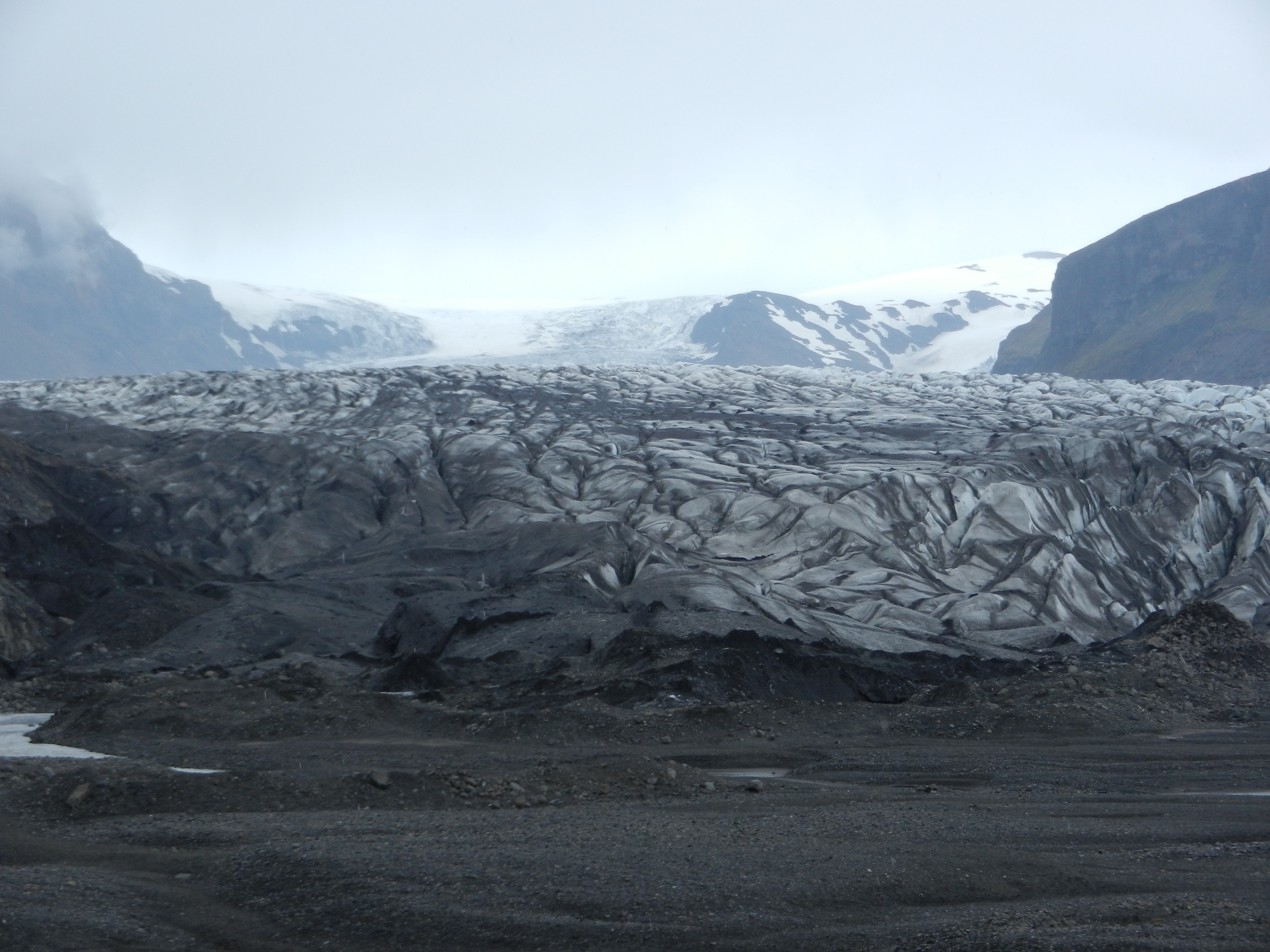 Čelo ledenika Skaftafellsjökull, islandija.